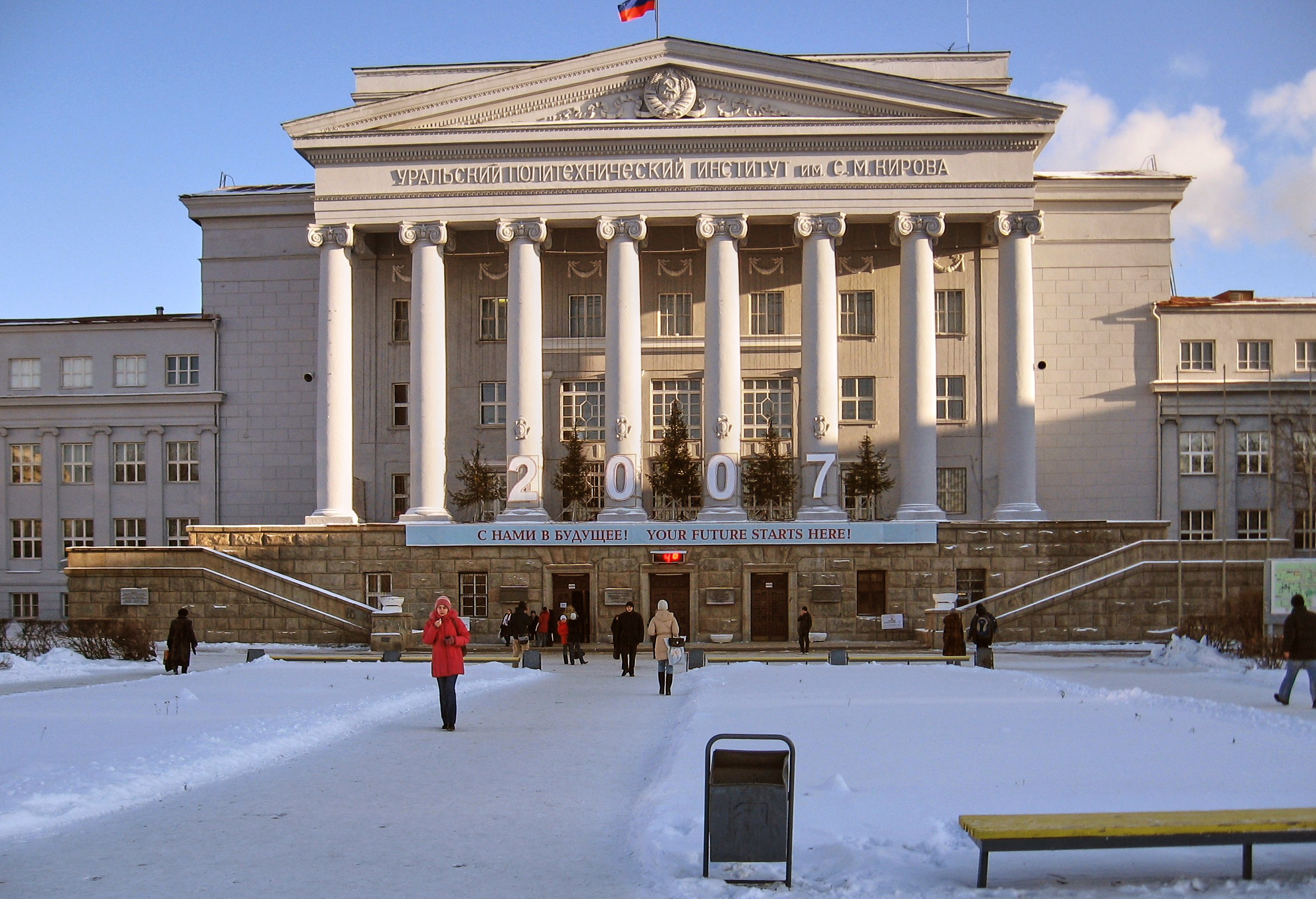 Название вашего изображения, Главный корпус УГТУ-УПИ